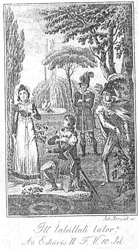 Gombos Imre: Az esküvés c. drámájának címlapja.